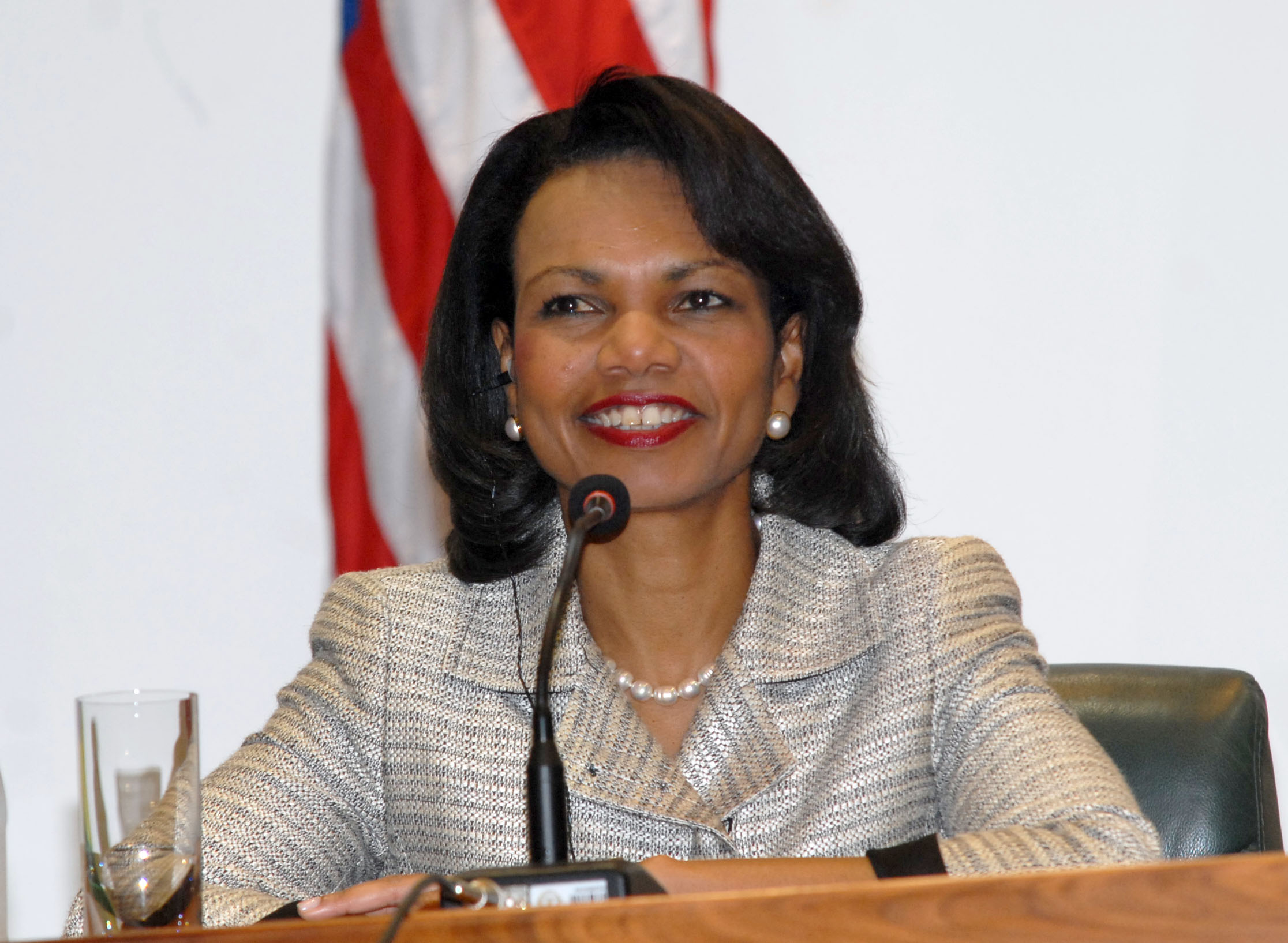 Secretária de Estado norte-americana, Condoleezza Rice, fala à imprensa após encontro com o presidente Luiz Inácio Lula da Silva